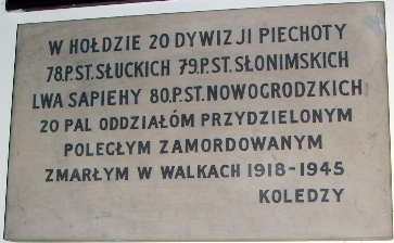 Tablica w kościele św. Andrzeja Boboli w Londynie